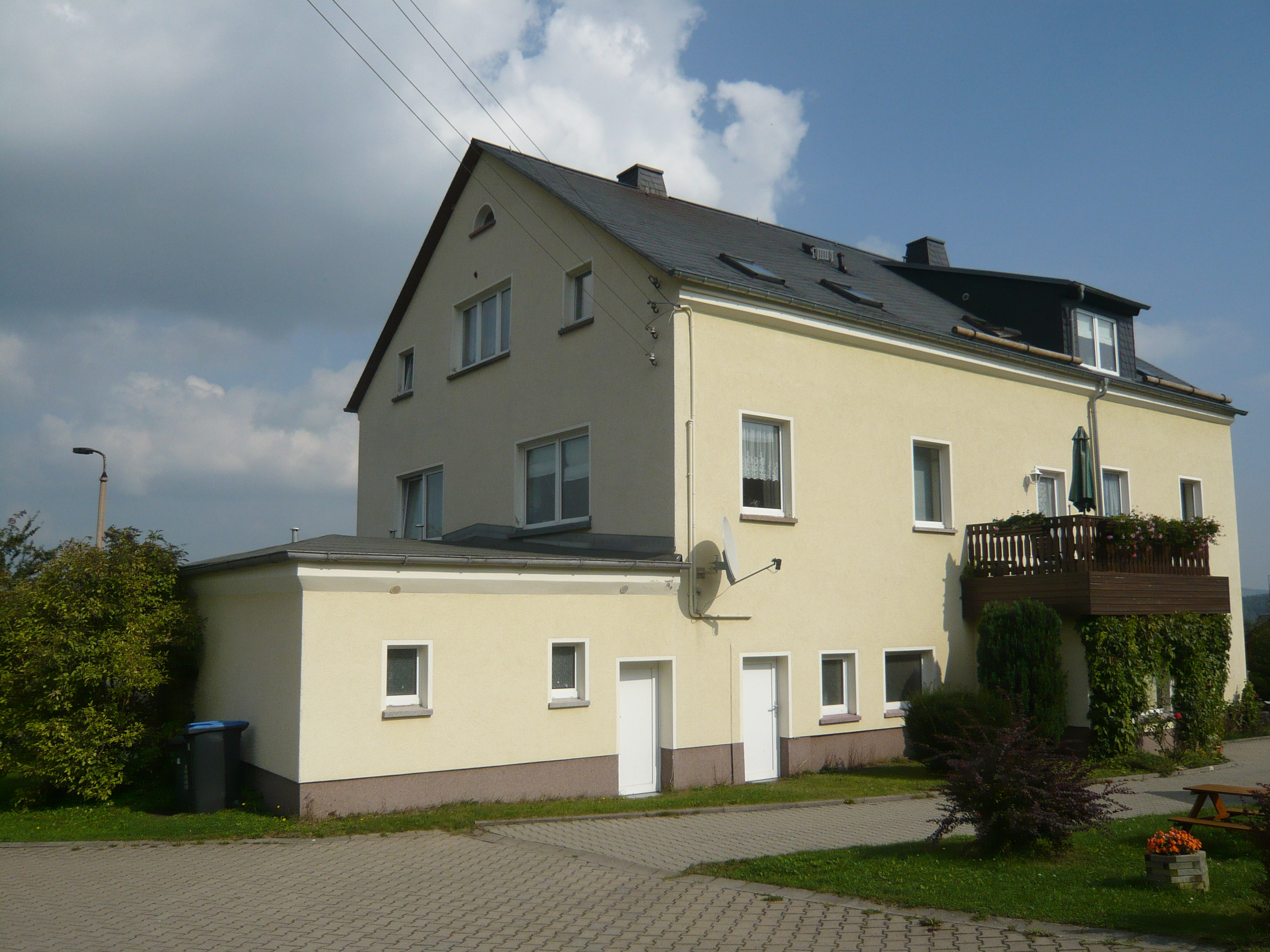 Kirche in Aue: Kirche im Anbau